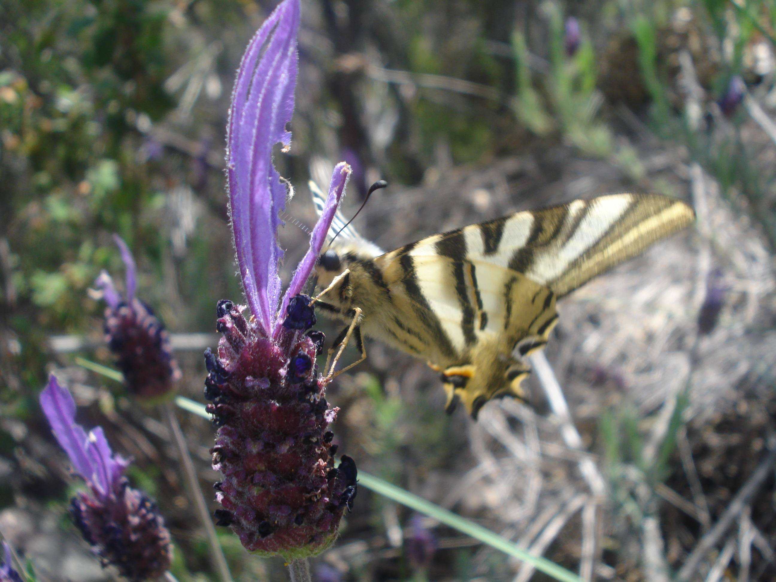 Mariposa podalirio ibérica (Iphiclides feisthamelii) libando lavanda.